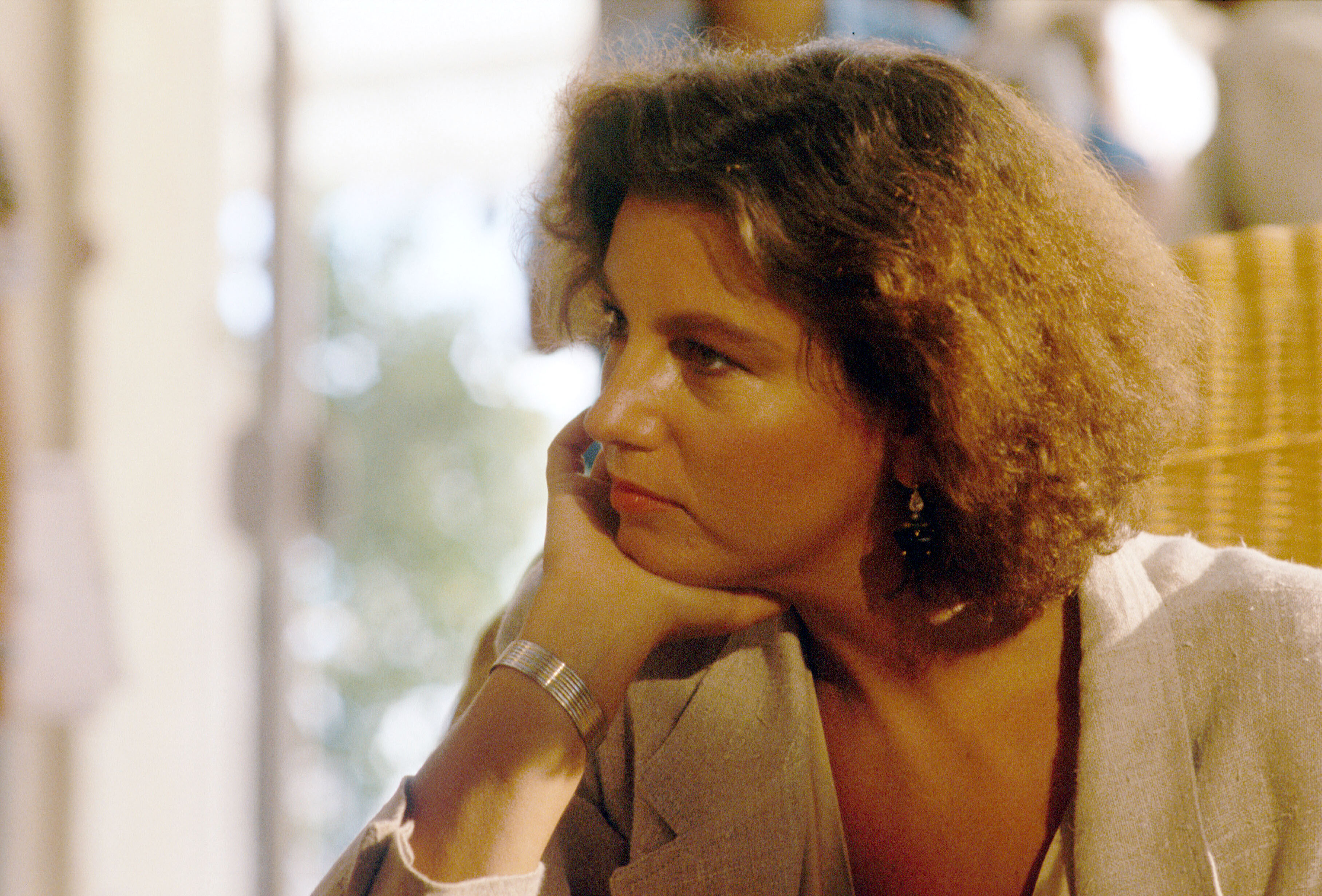 alla Mostra del cinema di Venezia del 1992